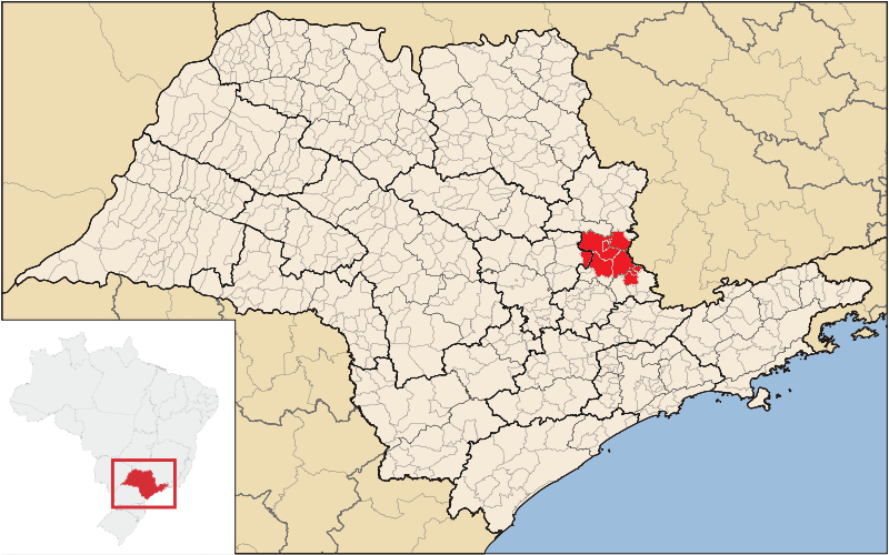 Região De Mogi Guaçu